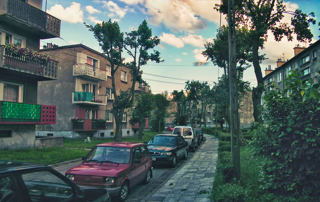 Widok na ul. okólną